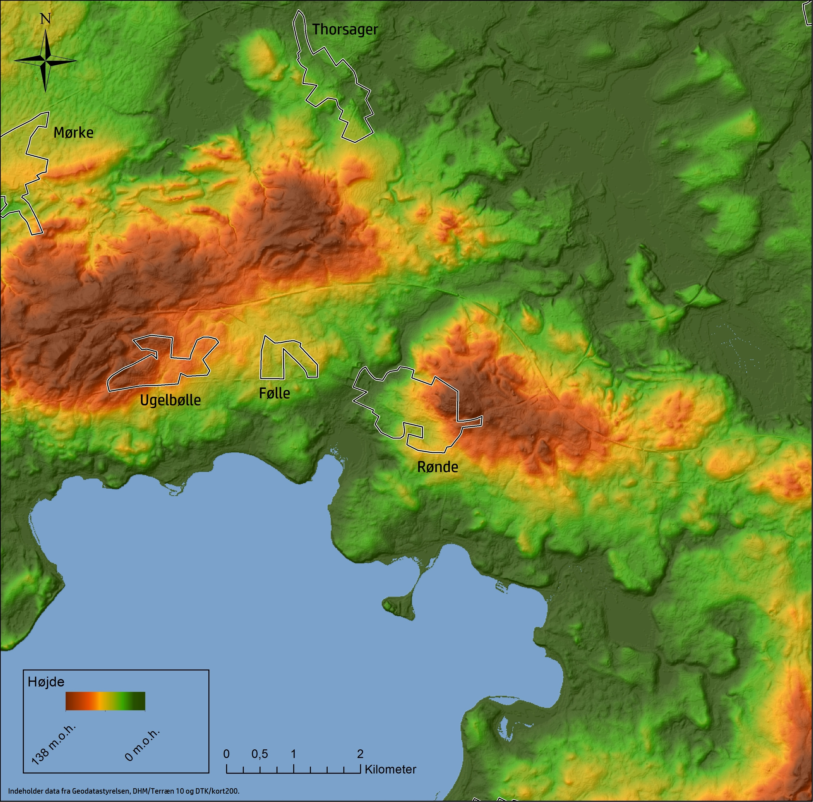 Højdemodel for området omkring byen Rønde på det sydlige Djursland. Kortet er genereret på baggrund af data fra Geodatastyrelsen (DHM/terræn10 og DTK/kort200).